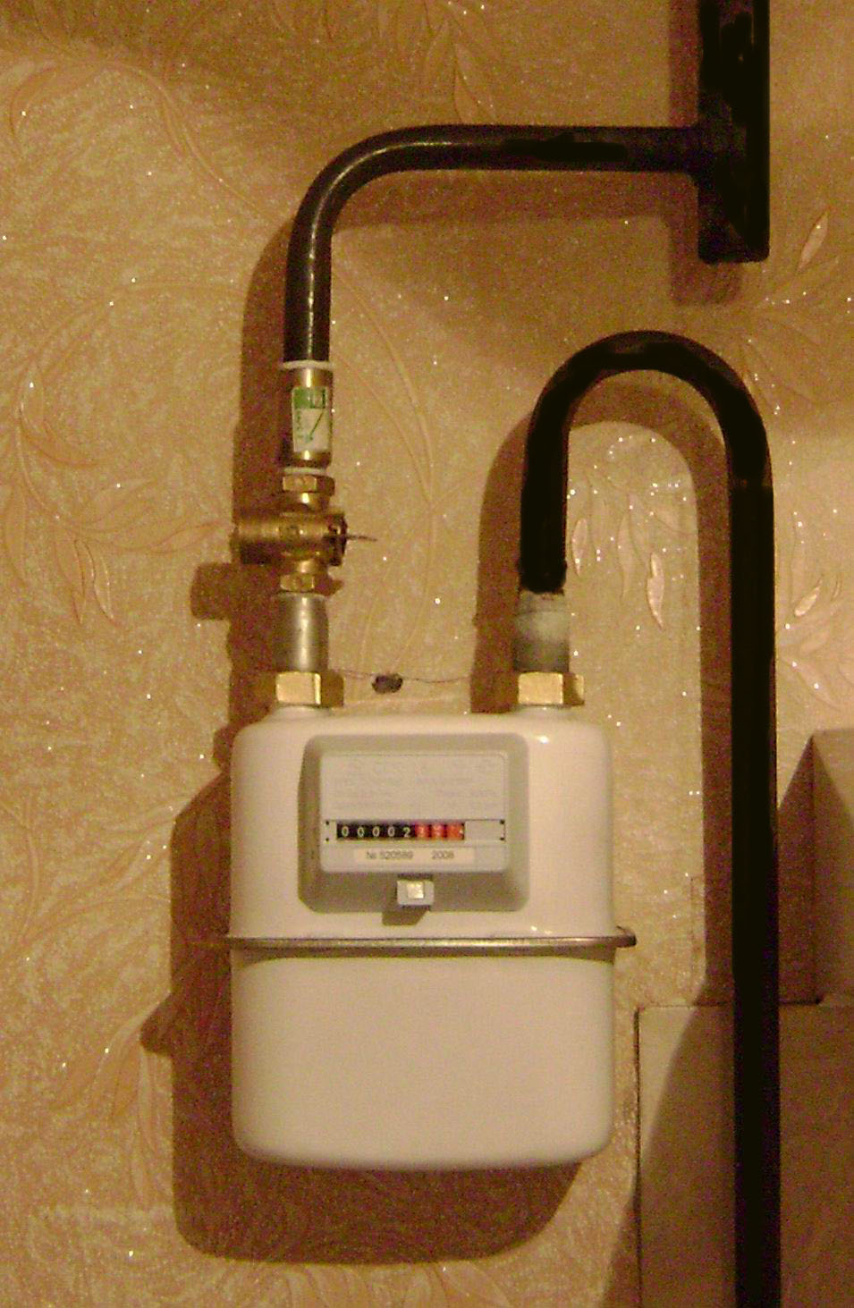 Счетчик газа в квартире на кухне